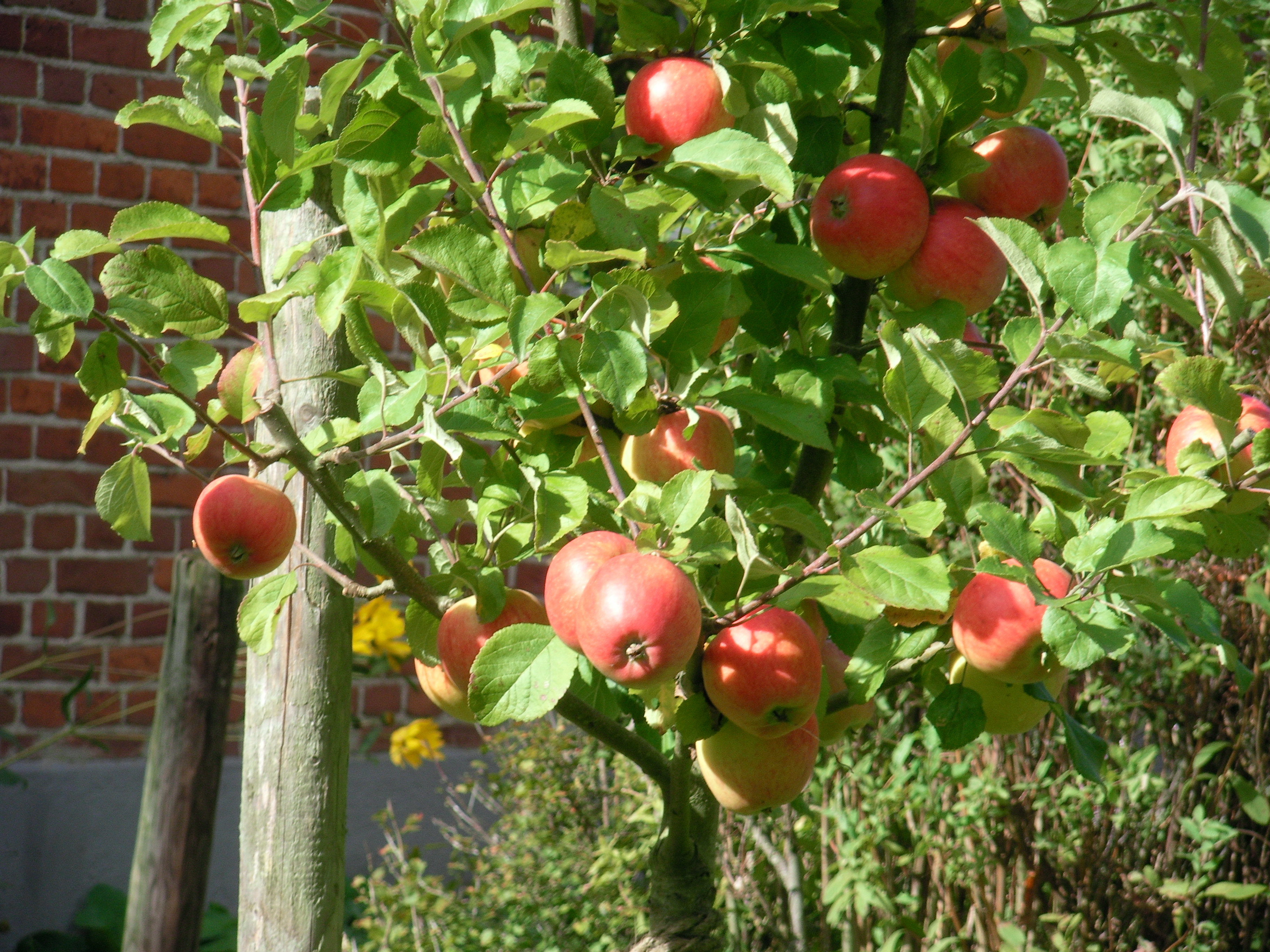 Alkmene im September 2010